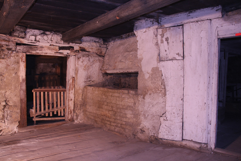 Bauernhaus "Villa Goldonkel" in Pfronten, Küche im alten Gebäude